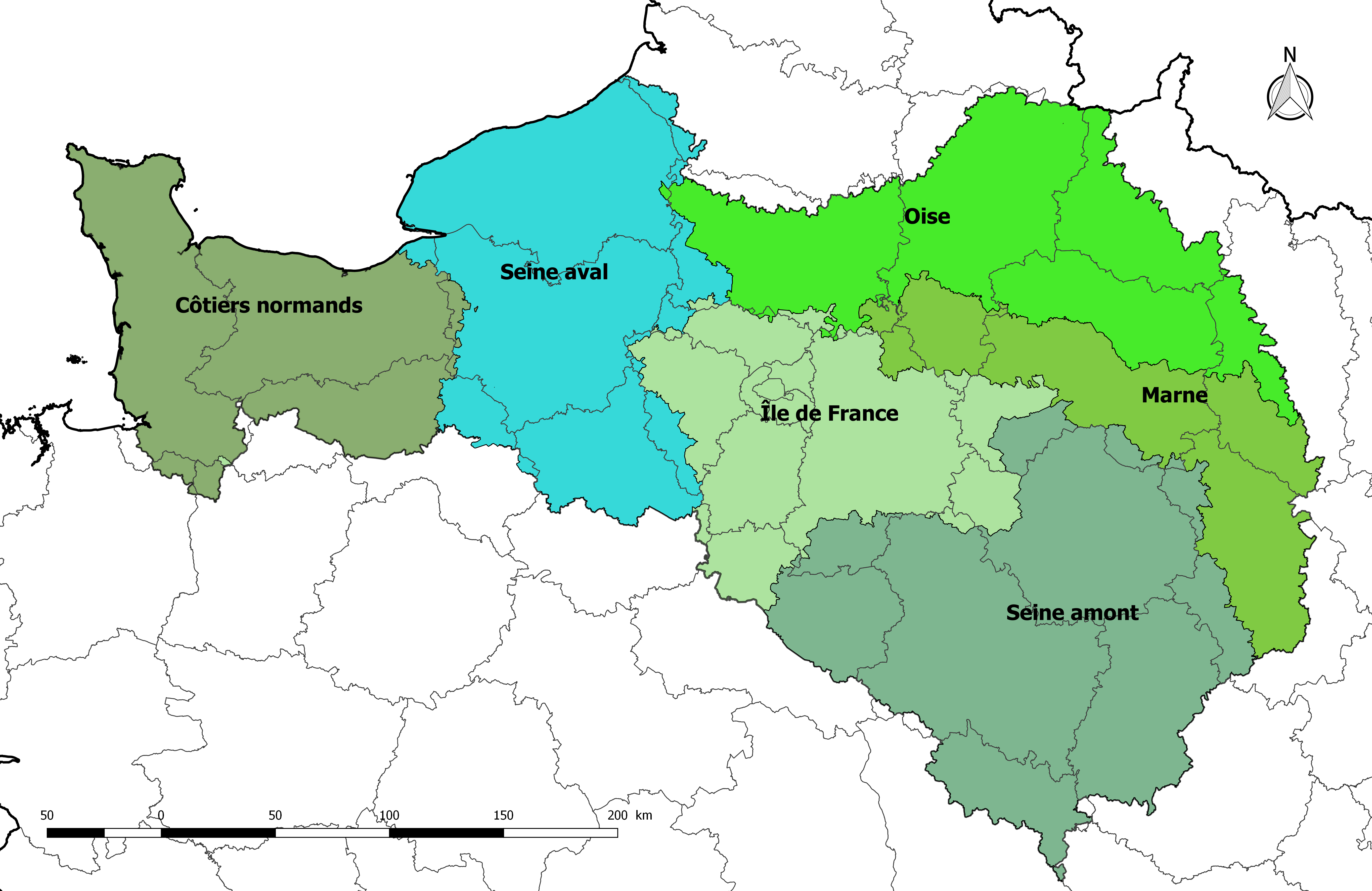 Carte de la circonscription de bassin Seine-Normandie en France, avec les sous-bassins qui la composent.